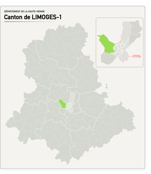 Carte du nouveau canton de Limoges-1.